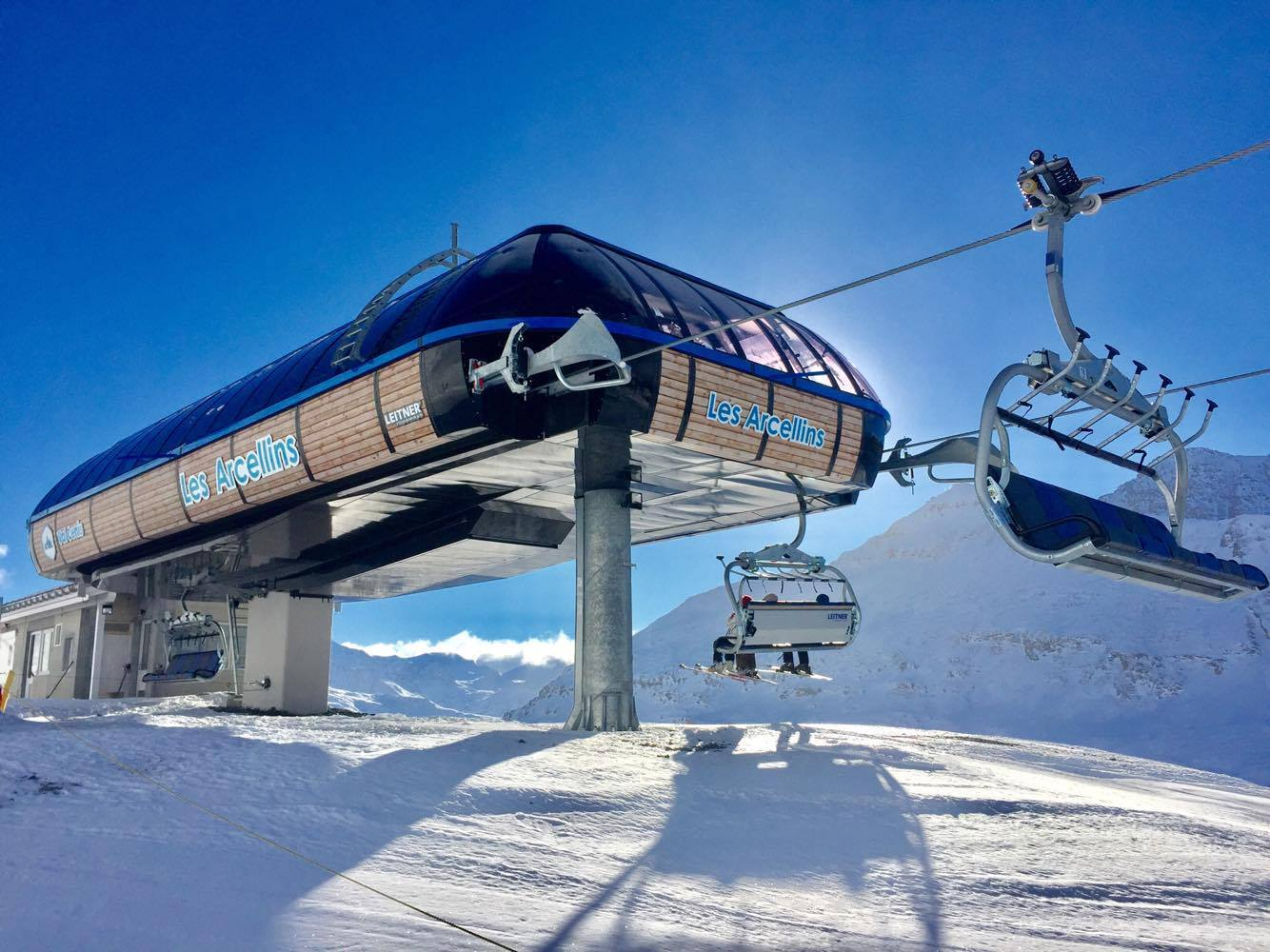 Télésiège TSD6 des Arcellins dans la stations de ski de Val Cenis en Haute Maurienne Vanoise